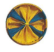 eigen tekening